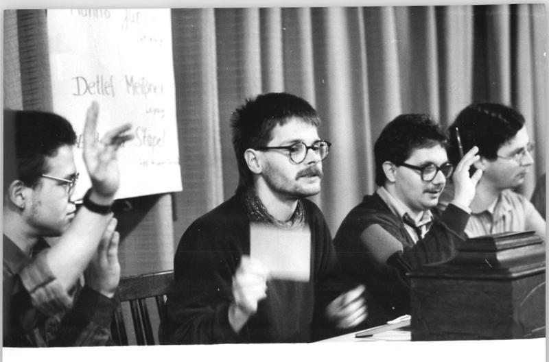 Leipzig, Gründungsveranstaltung, Homosexuellenverband ADN-ZB Kluge 18.2.90 Leipzig: Homosexuellenverband gegründet- Auf Einladung der Homosexuelleninitiative Leipzig mit ihren mehr als 200 Mitgliedern wurde in der Messestadt ein republikweiter Homosexuellenverband gegründet. Hier stellen sich die Kandidaten für einer Sprecherrat vor.